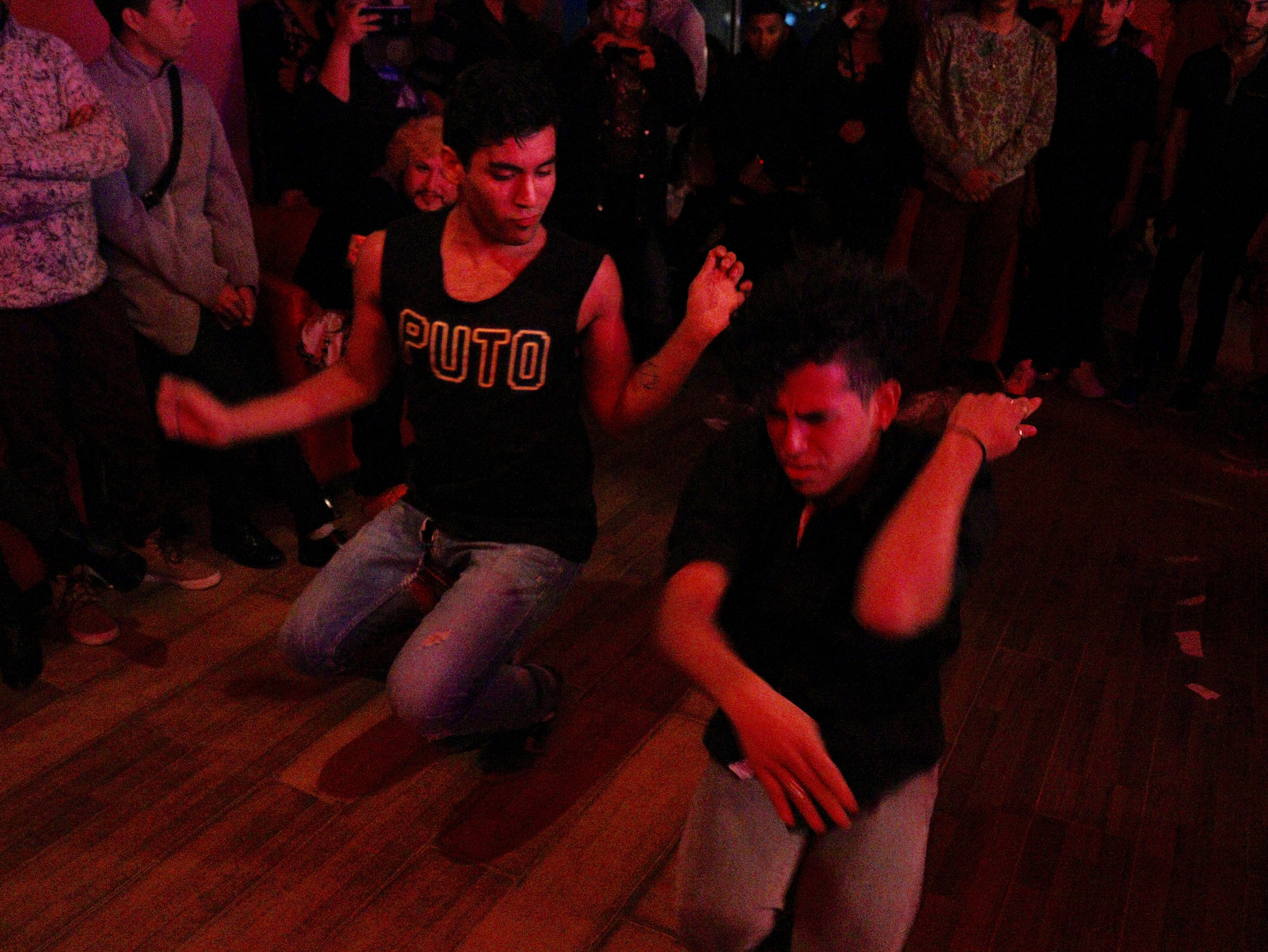 Mini Ball 30 de Enero 2016, en La Purísima